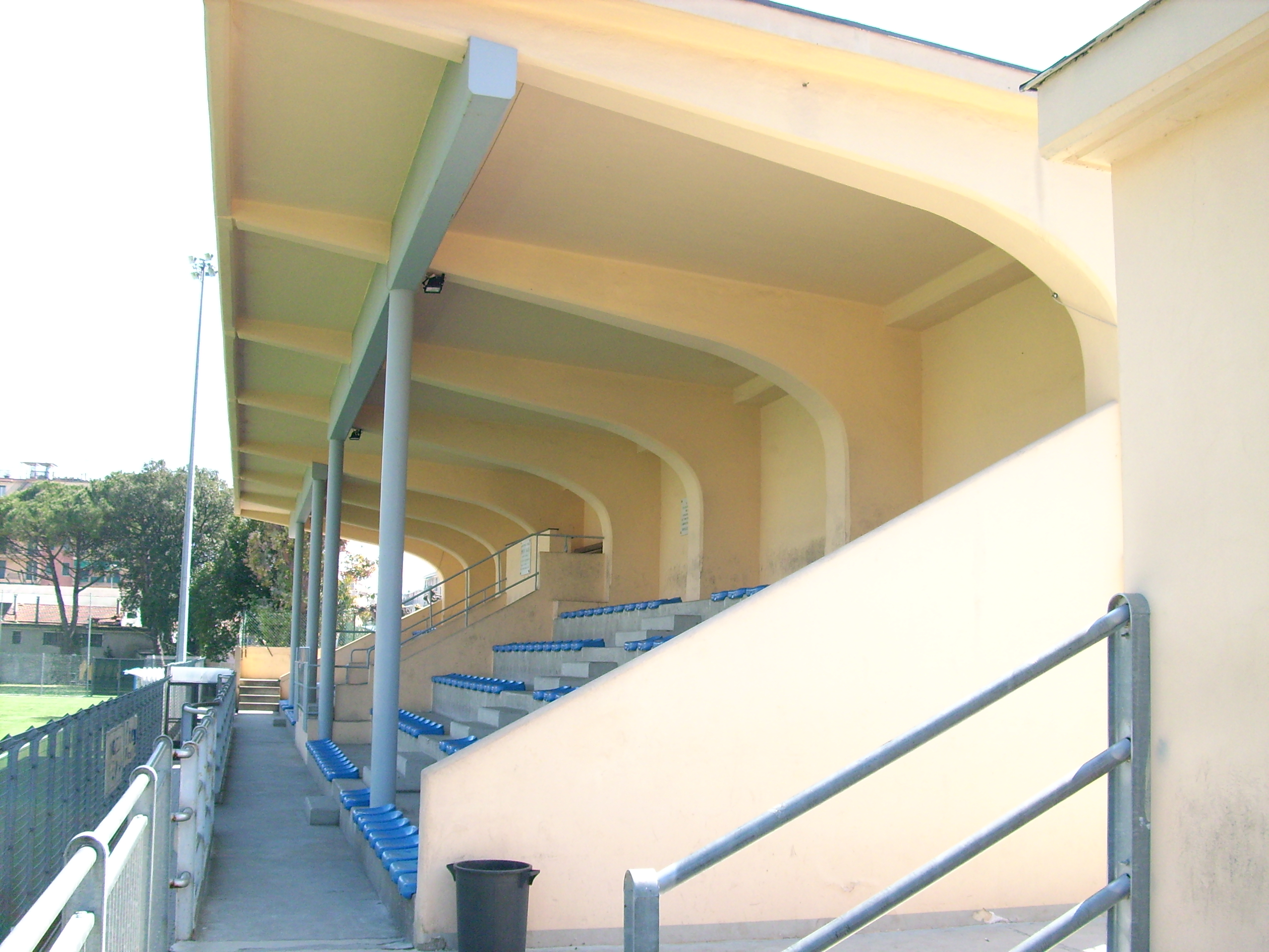 Stadio Comunale Umberto Macera - Tribune